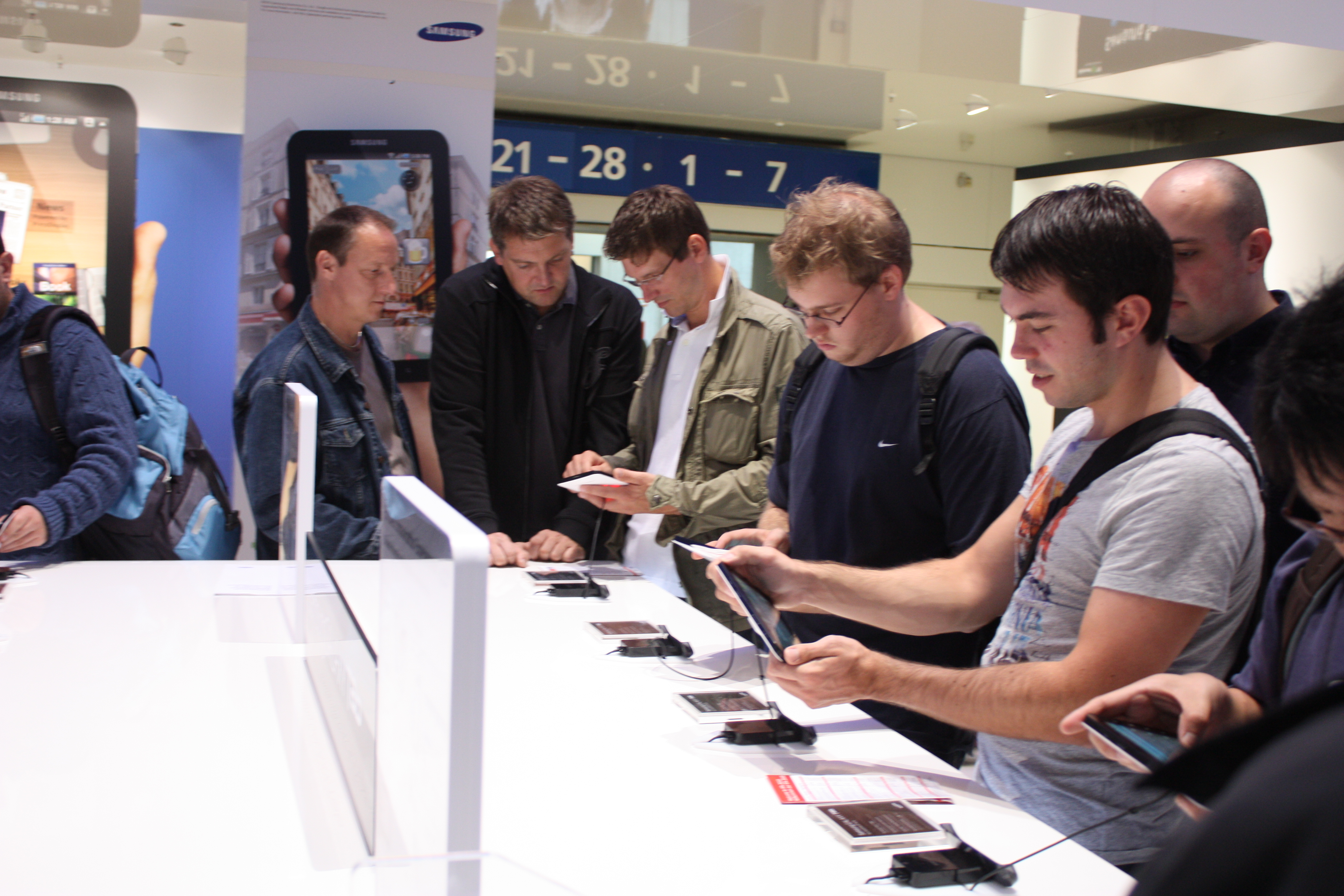 IFA 2010, Berlin